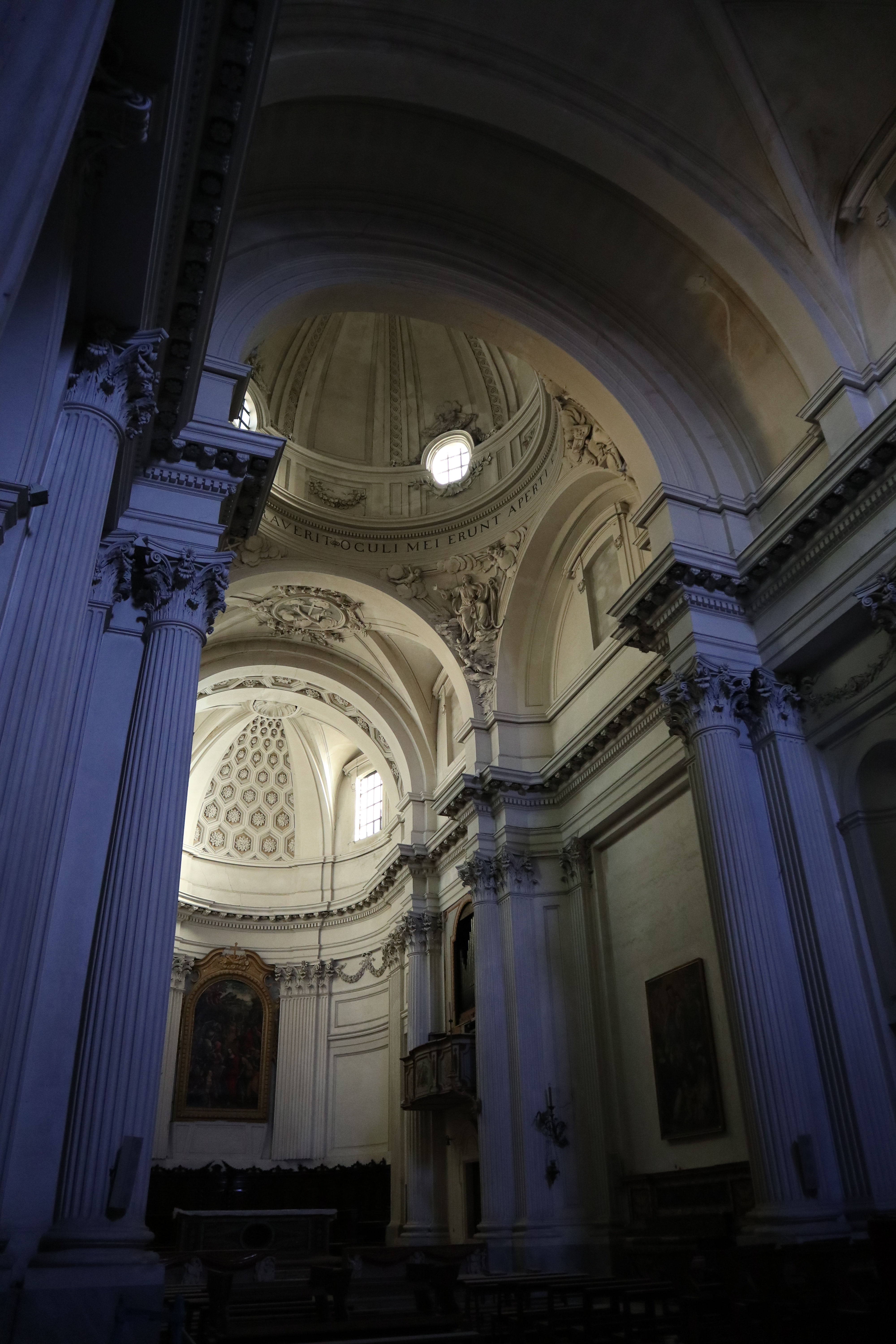 Presbiterio